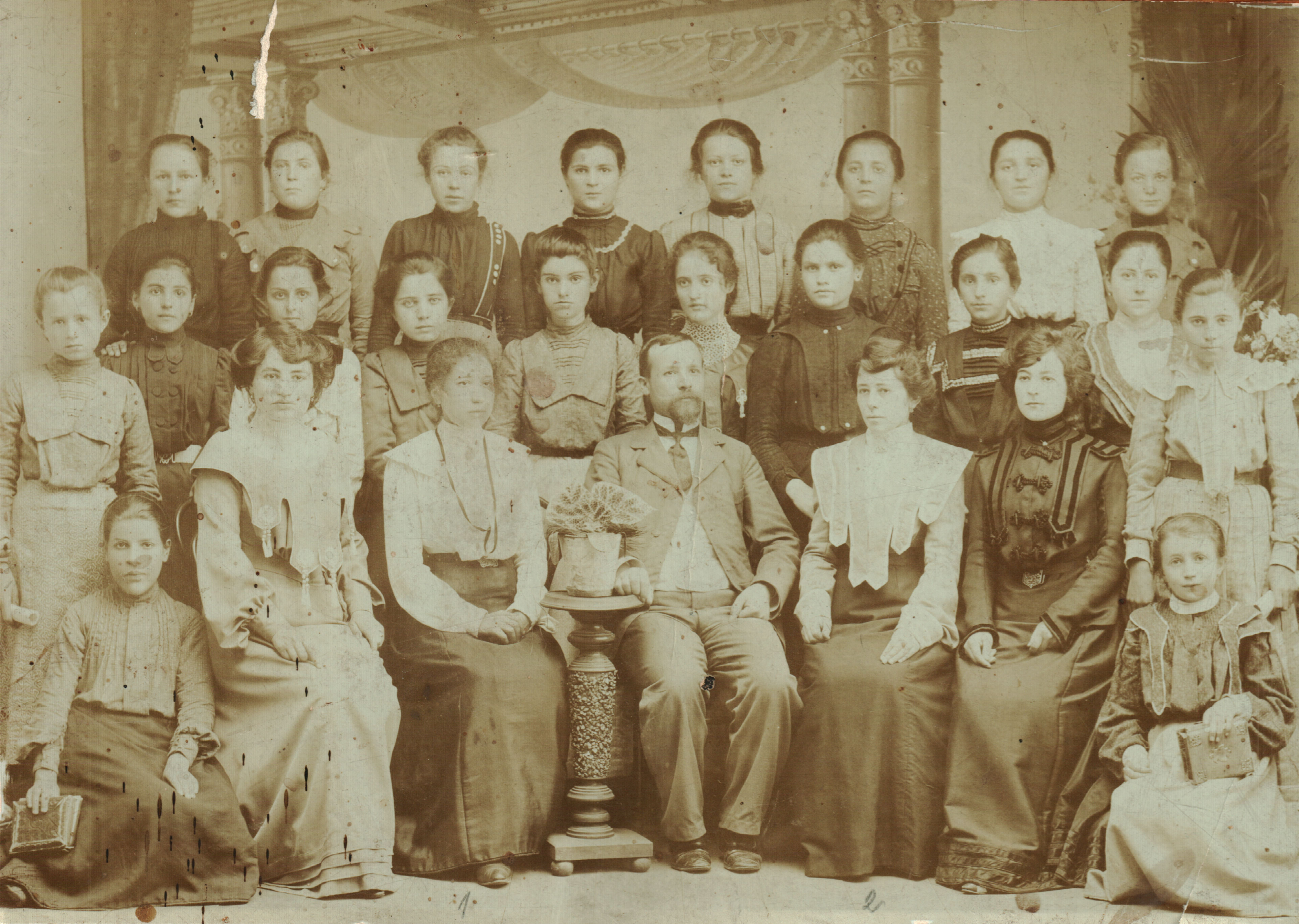 Учители и ученици от училището в Битоля.